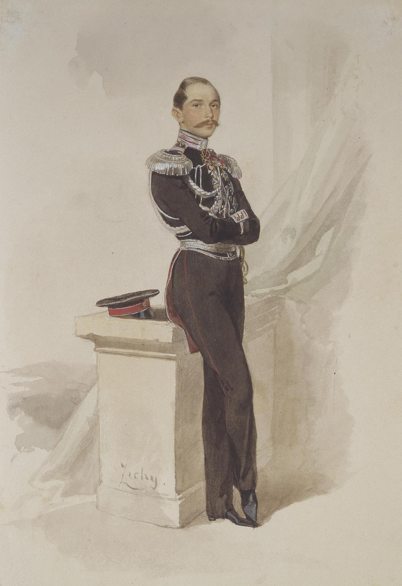 Альбом "Офицеры лейб-гвардии Конно-пионерского дивизиона"